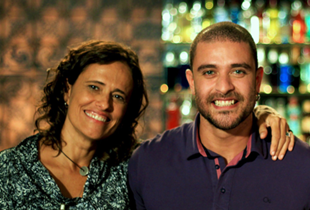 Os cantores brasileiros Zélia Duncan e Diogo Nogueira na TV Brasil.